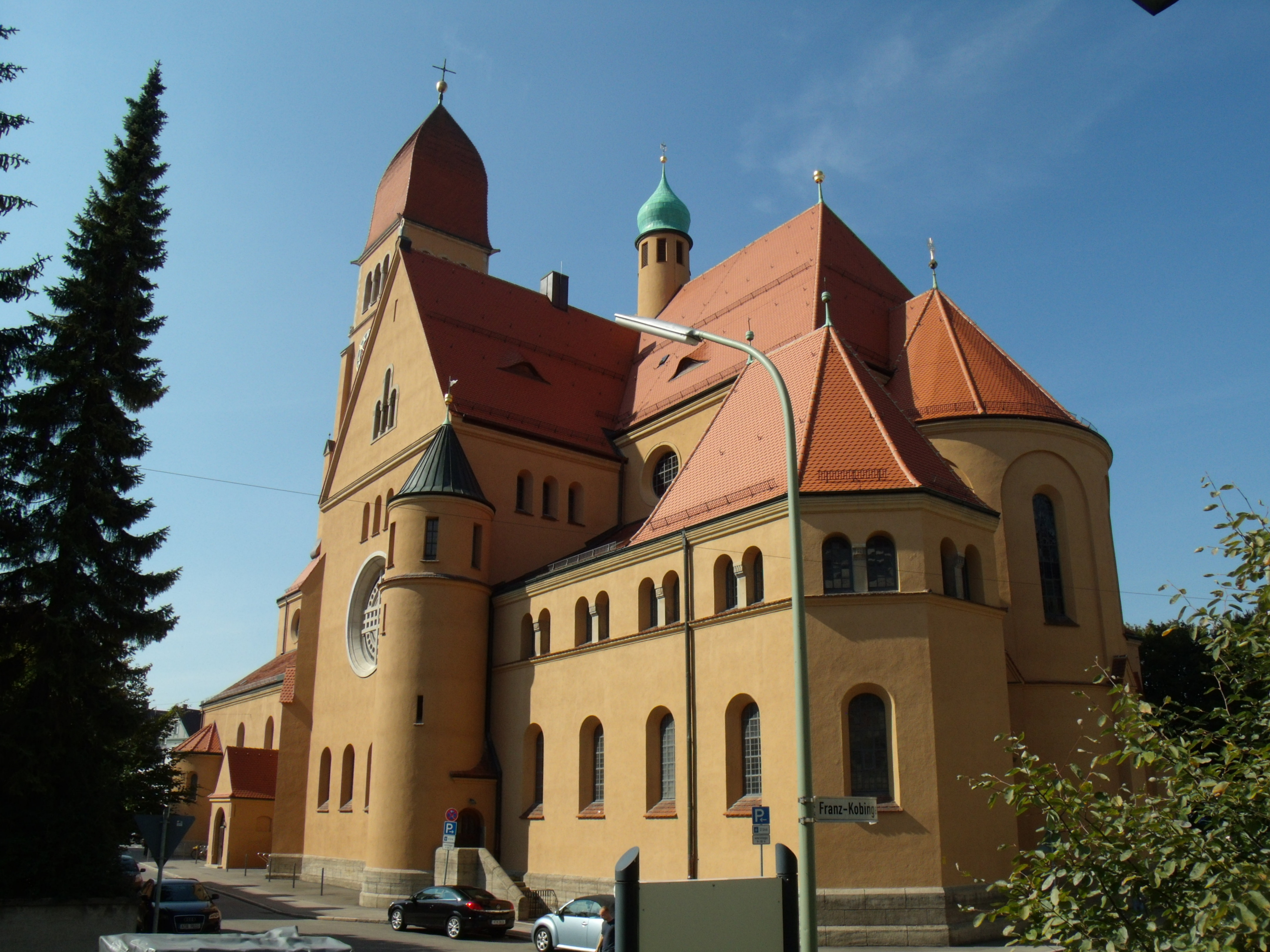 Herz-Jesu-Kirche Pfersee